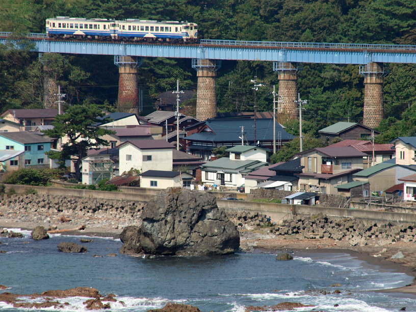 五能線、小入川海岸